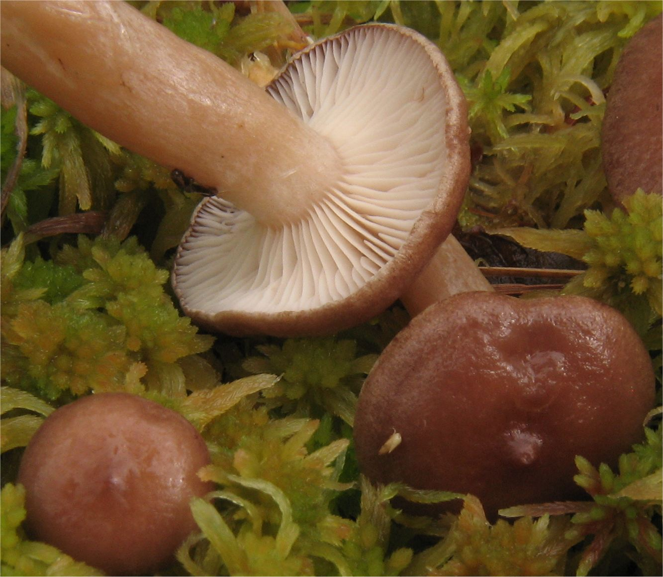 Lactarius pilatii Z. Schaef.